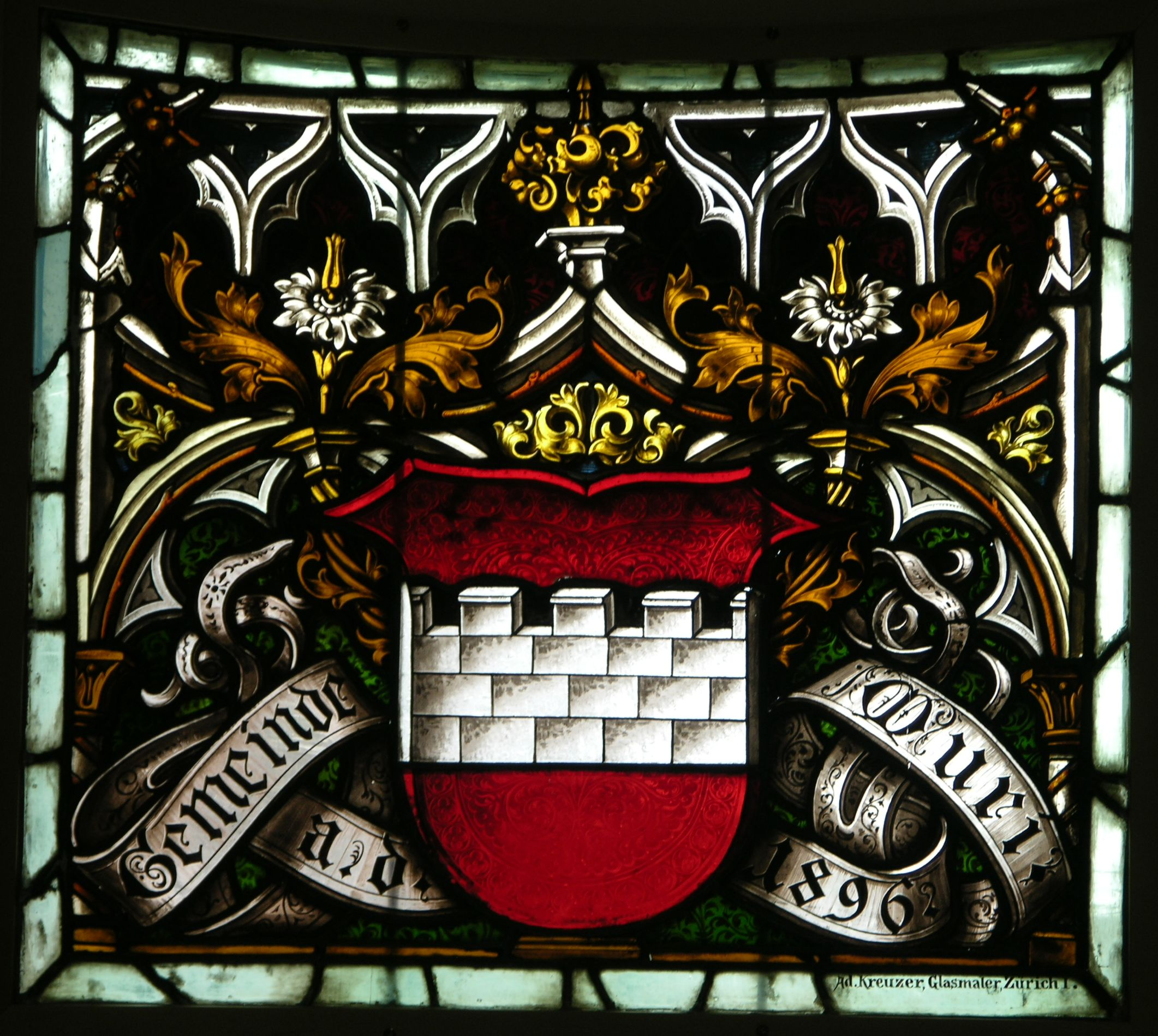 Wappen von Muri im Karl-Moser-Haus der Alten Kantonsschule Aarau